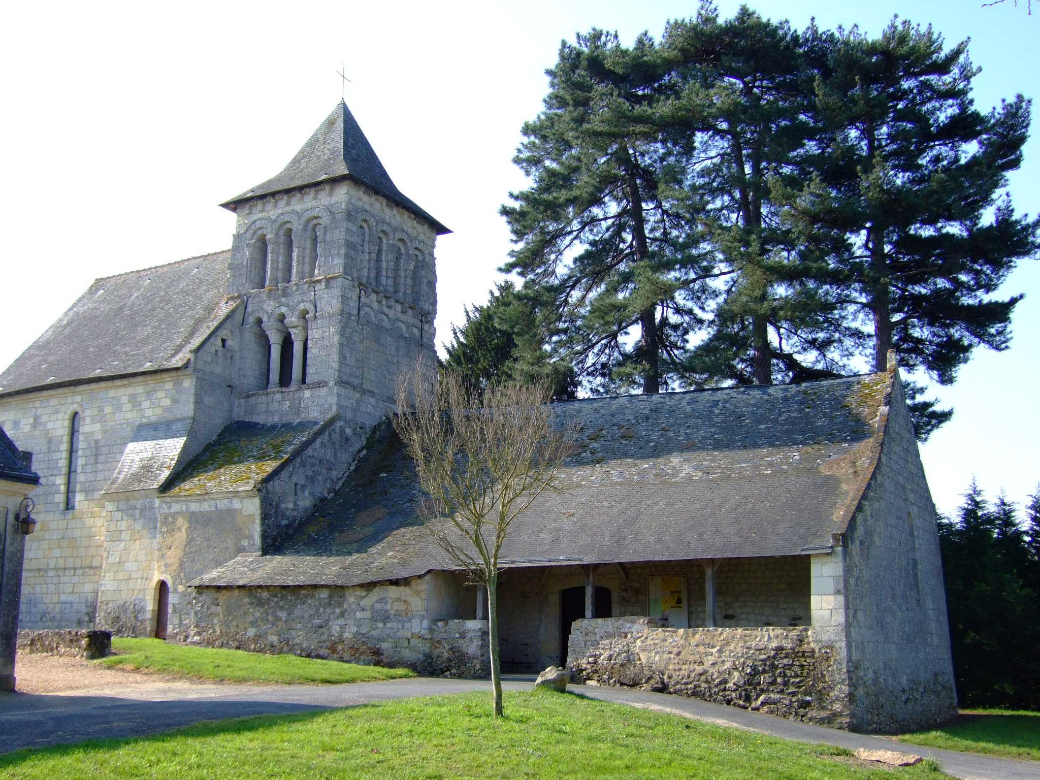 L'église Saint-Barnabé à Saint-Georges-des-Sept-Voies